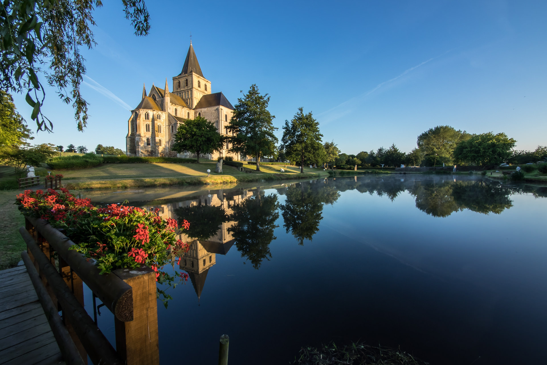 Vu de l'étang aux moines à Cerisy-la-Forêt (Manche, France).